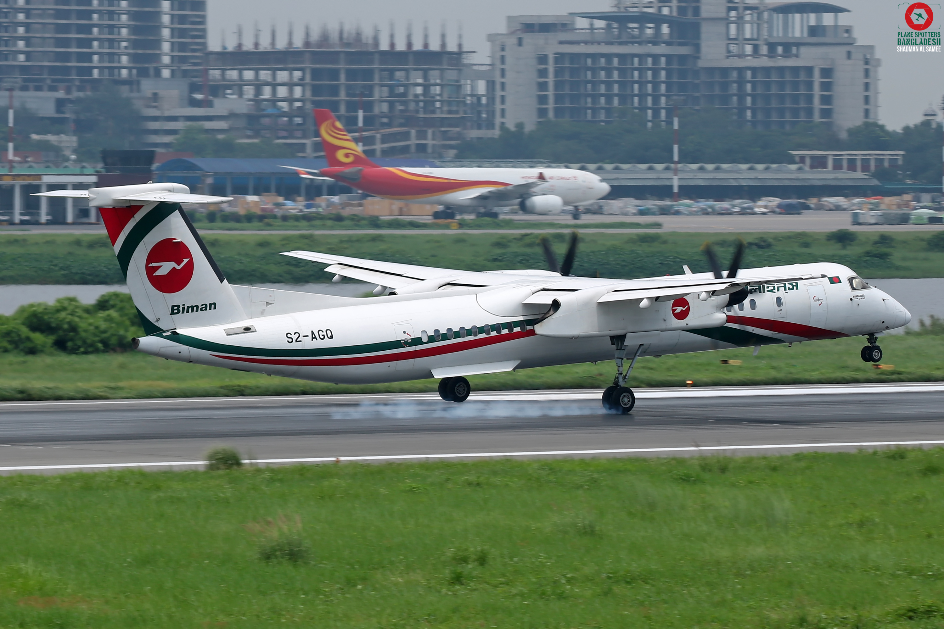 VGHS 2018.